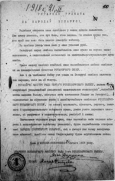 Беларуская (тарашкевіца): Першая Ўстаўная грамата Рады Беларускай Народнай Рэспублікі